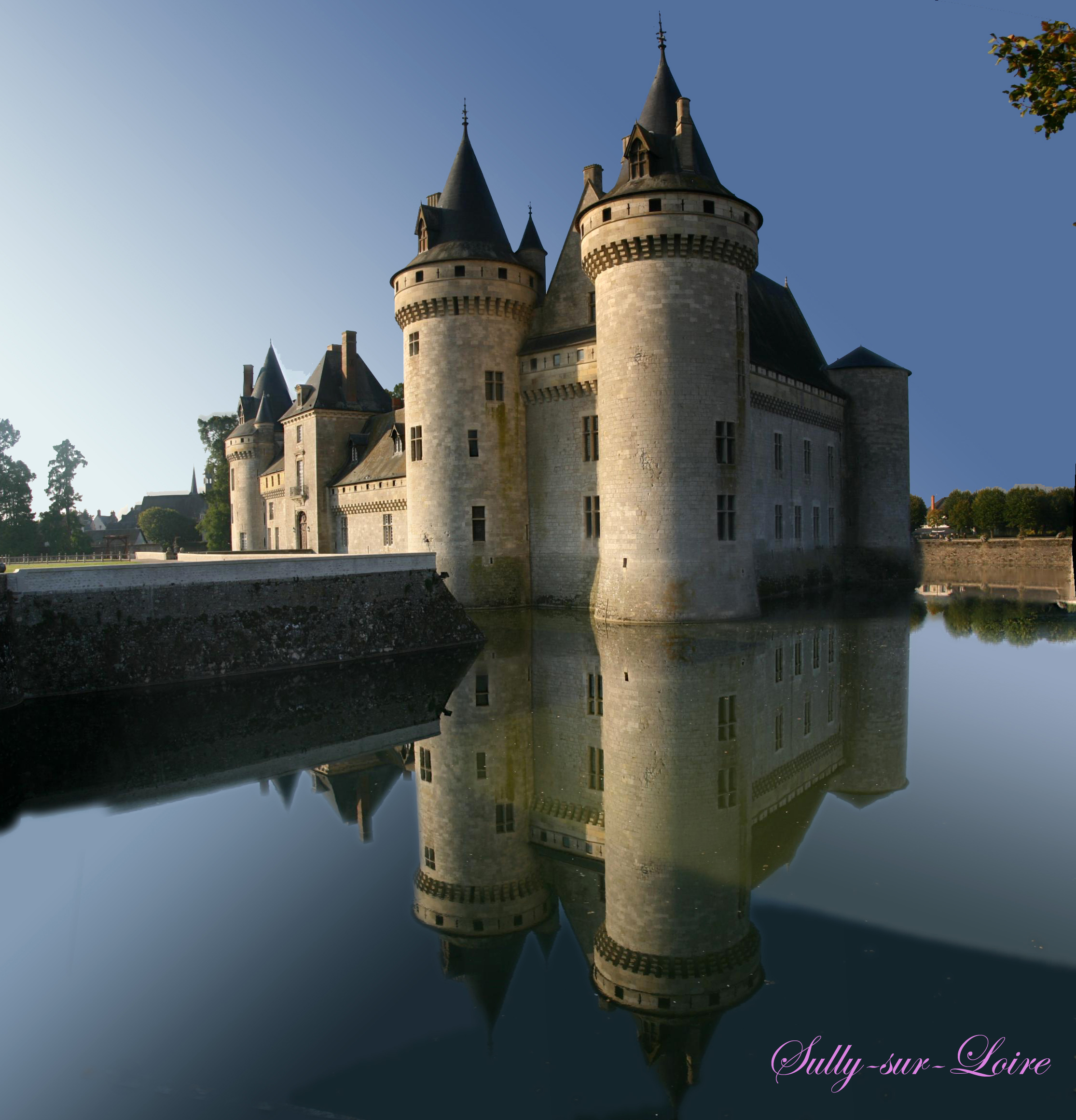 Schloss Sully-sur-Loire